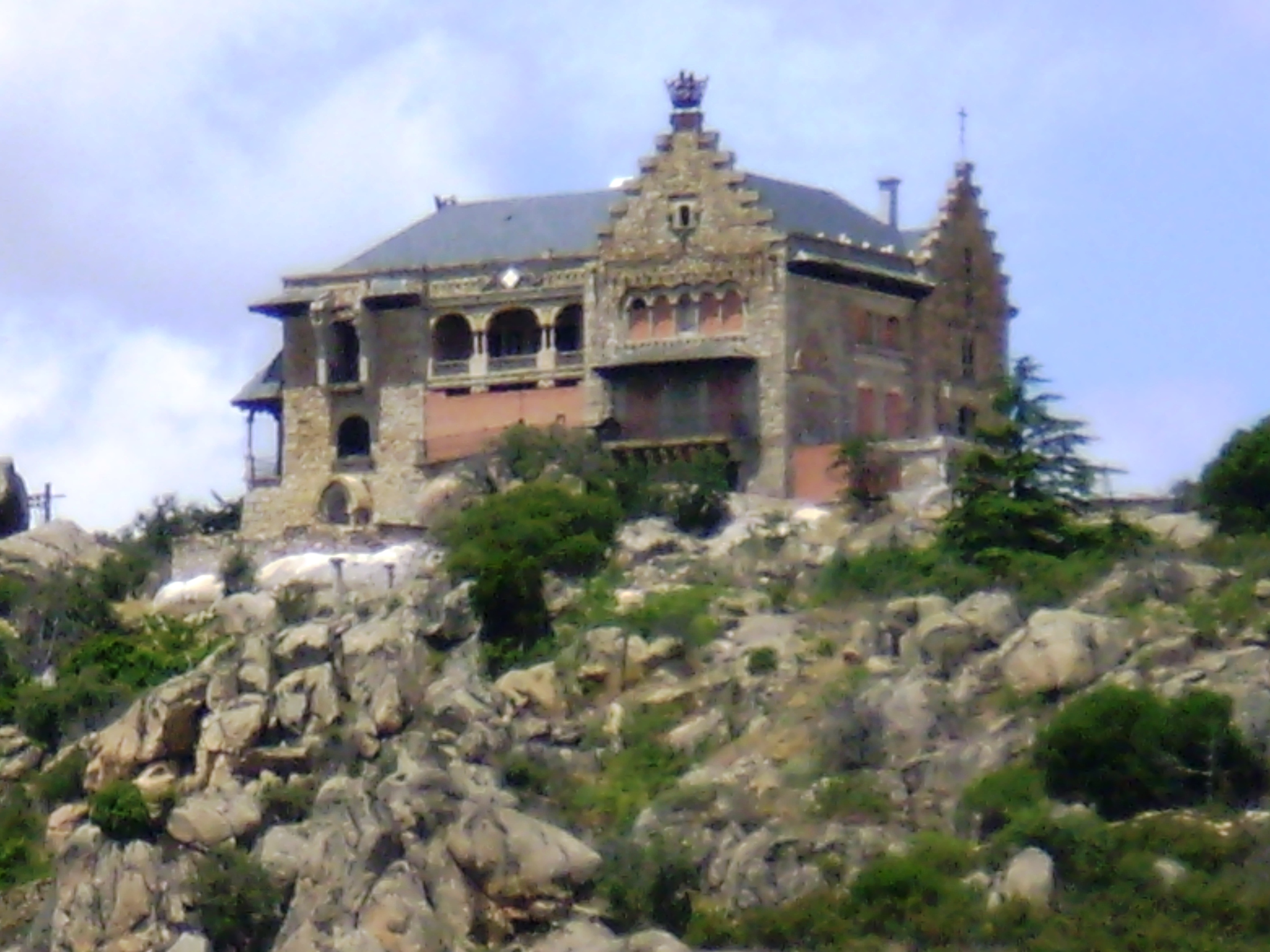 Palacio del Canto del Pico, Torrelodones, Madrid, Spain